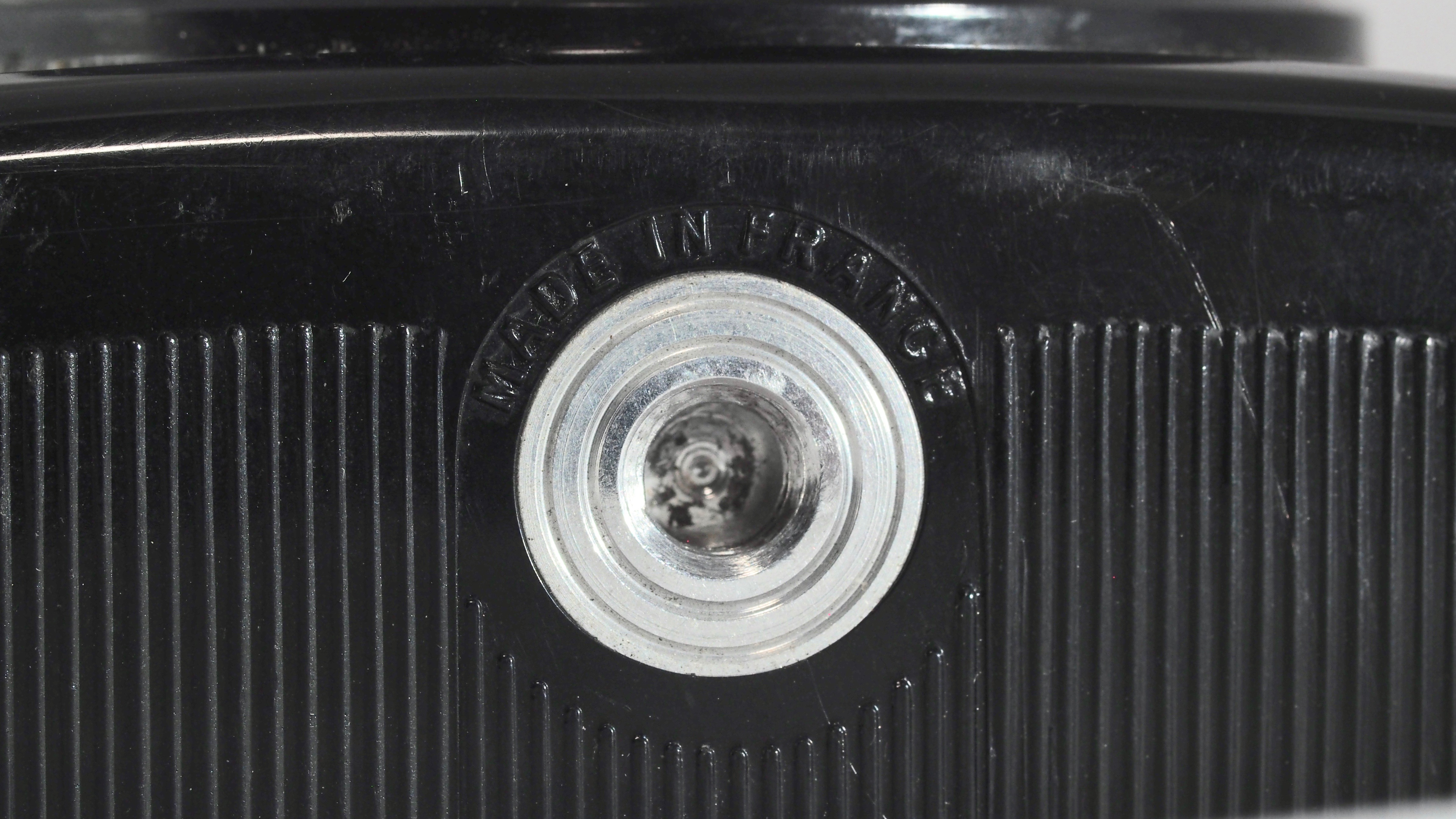 Click Made in France um das Stativgewinde